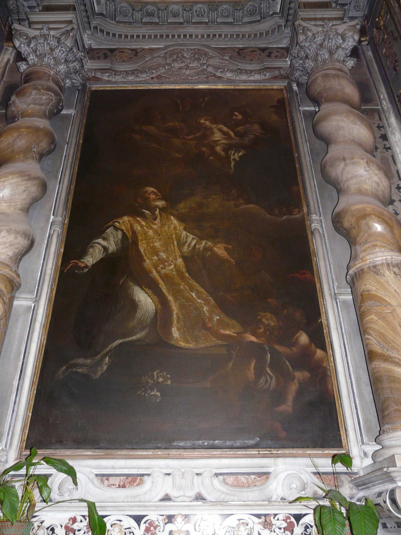 Dipinto di Giovanni Lorenzo Bertolotto (San Filippo Neri in contemplazione della Vergine con il Bambino), chiesa dei Santi Nicolò ed Erasmo, Genova Voltri, Liguria, Italia